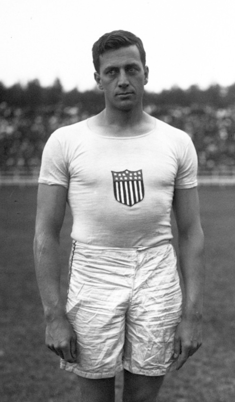 23-7-12, Reims, George Philbrook, américain, [lancer du poids, portrait] : [photographie de presse] / [Agence Rol]